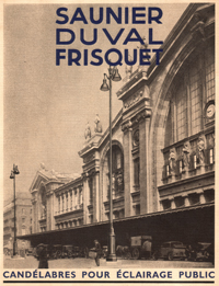 Affiche candélabre 1916